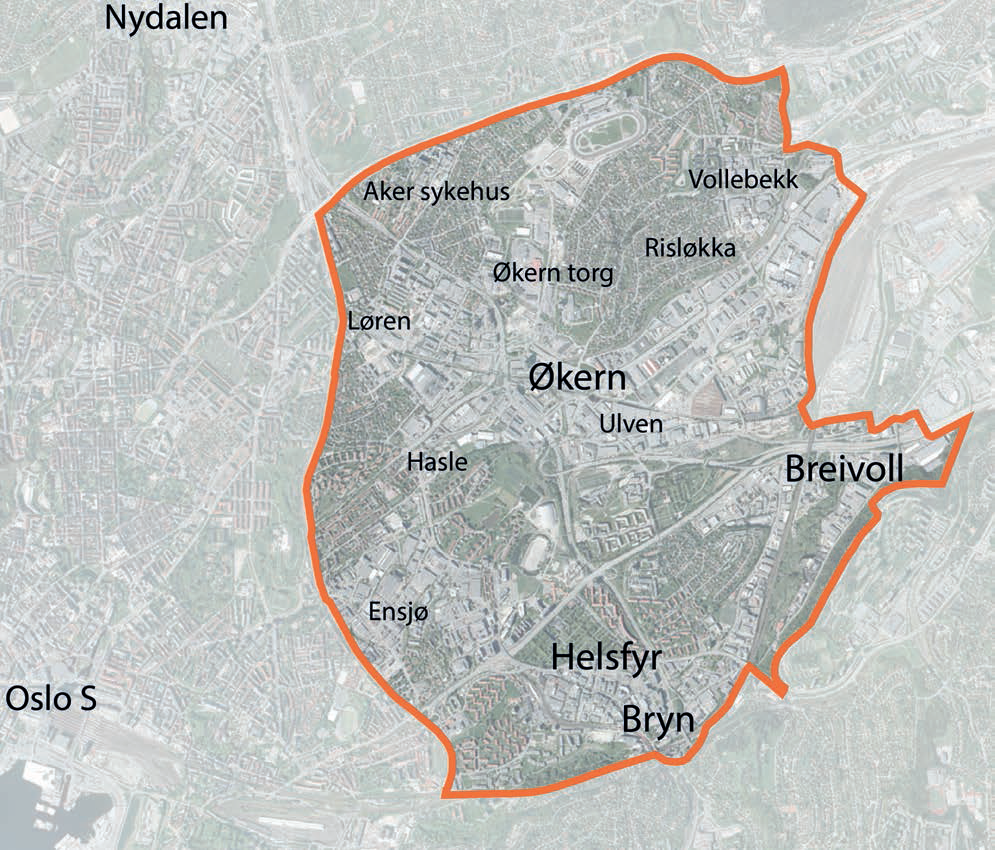 Kart over Hovinbyen